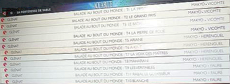 Ballade du bout du monde.